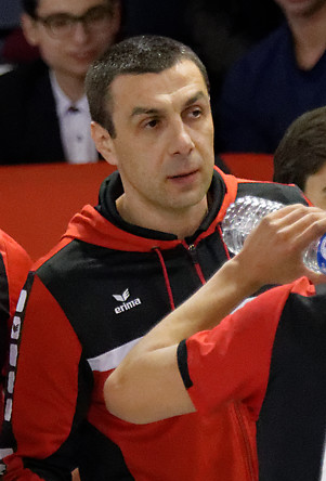 Ivry - Saint-Raphaël lors de la 19e journée du championnat de France de handball masculin le 23 mars 2016 au gymnase Auguste Delaune à Ivry sur Seine.